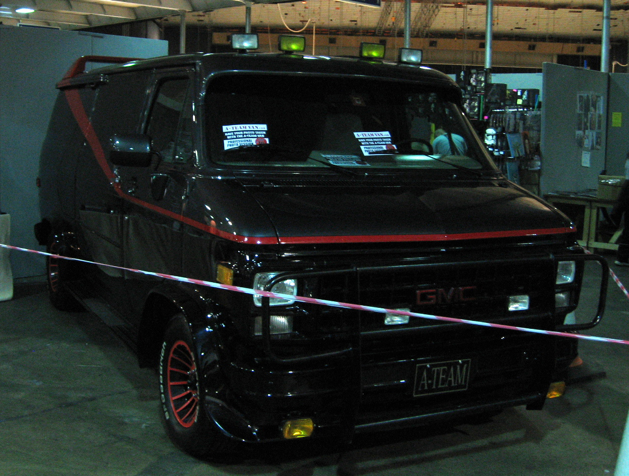 Der Van des A-Teams ist ein GMC Van der 1983er G-series. Vermutlich handelt es sich bei B.A.s Van um einen G-15 (500kg Zuladung möglich. Der Motor (5,7 L. V8) hatte ungefähr 240 PS gehabt, modifiziert von den Universal Studios in den Bereichen Luftzufuhr und Vergaser.